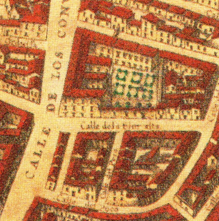 Topografía de la Villa de Madrid descrita por Don Pedro Texeira en 1656, en la cual se demuestran todas las calles al largo y ancho de cada una de ellas, las rinconadas y lo que tuercen las Plazas, fuentes, jardines y huertas con la disposición que tienen las parroquias, Monasterios y Hospitales están señalados sus nombres con letras y números que se hallaran en la tabla y los demás edificios, torres y delanteras de las casas de la parte que mira al Mediodía están sacadas al natural que se podrán tocar las puertas y ventanas de cada una de ellas.